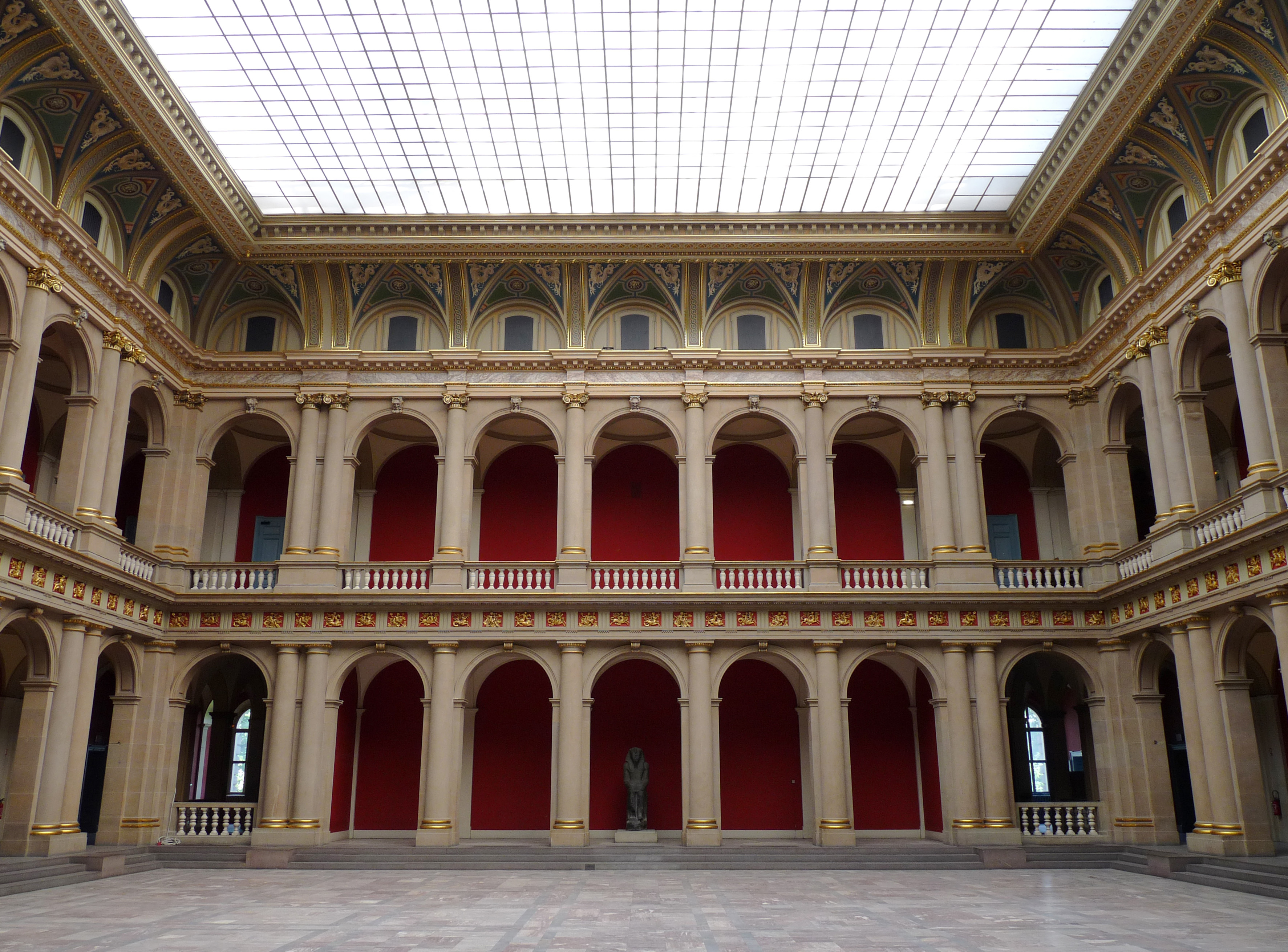 Aula du Palais Universitaire de Strasbourg. Face à l'entrée. Au centre, grande statue assise de Ramsès II.